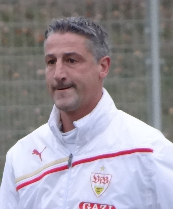 Jürgen Kramny, Trainer des VfB II. Aufgenommen von